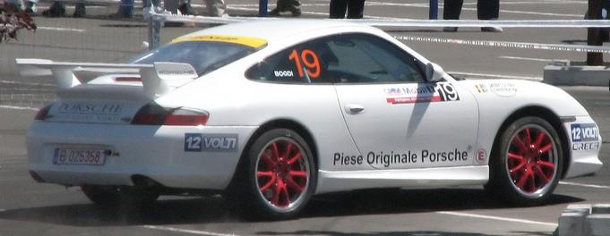 24 Iunie 2007 - etapa 6-a nationala - proba speciala din parcarea hipermarketului Cora.